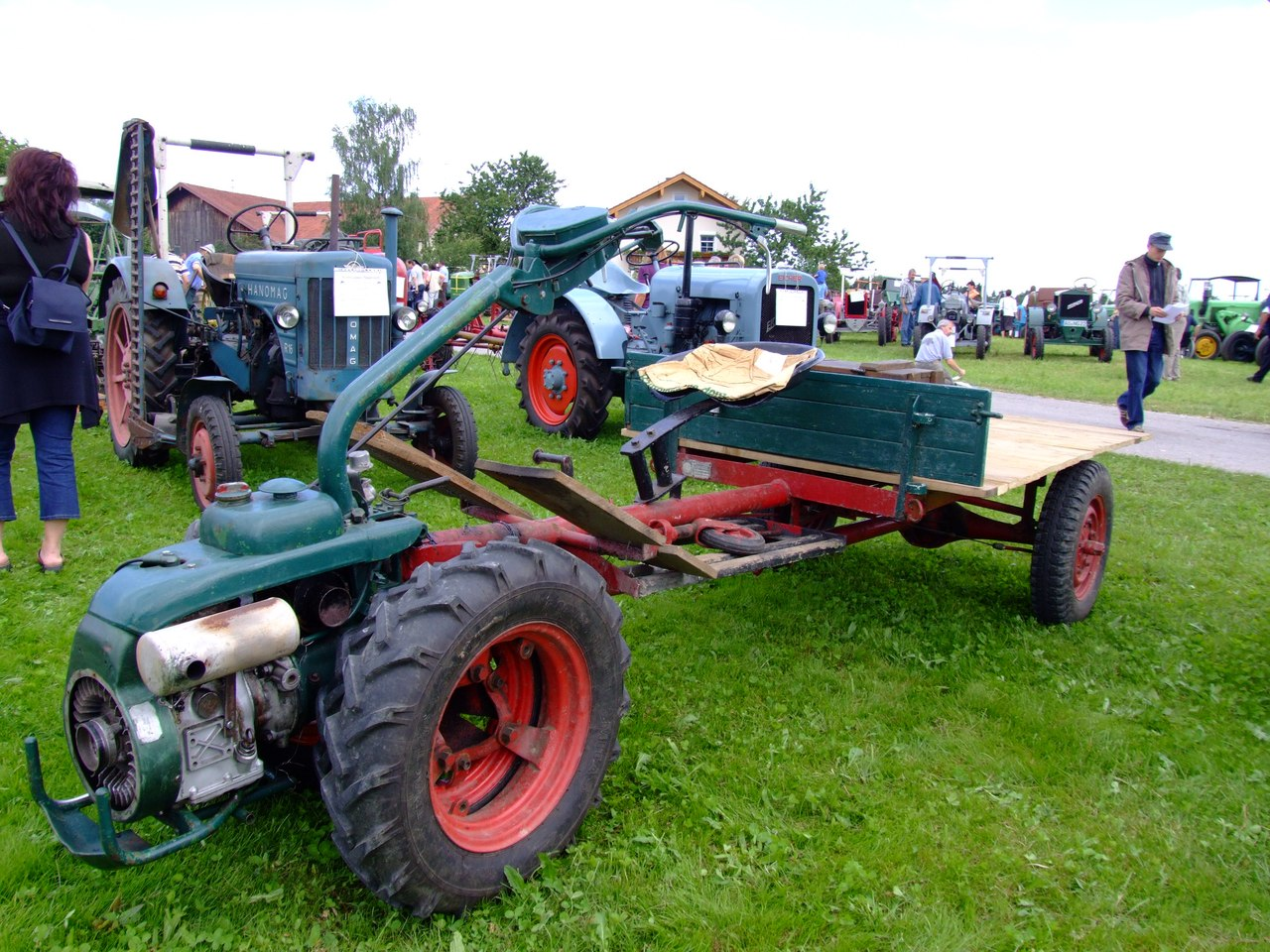 Agria-Einachsschlepper (vermutlich Typ 2800D) von 1963 mit 7 PS und DK6-Motor von Motorenbau Alfred Berning, Motor-Typenschild siehe File:Agria 7PS 1963 .JPG – Diese Agria-Einachsschlepper wurden mit Motoren verschiedener Hersteller gebaut. Sie konnten entsprechend ausgewechselt werden.